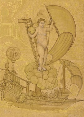 Iluminura de origem europeia executada por artistas do Império Mogol.